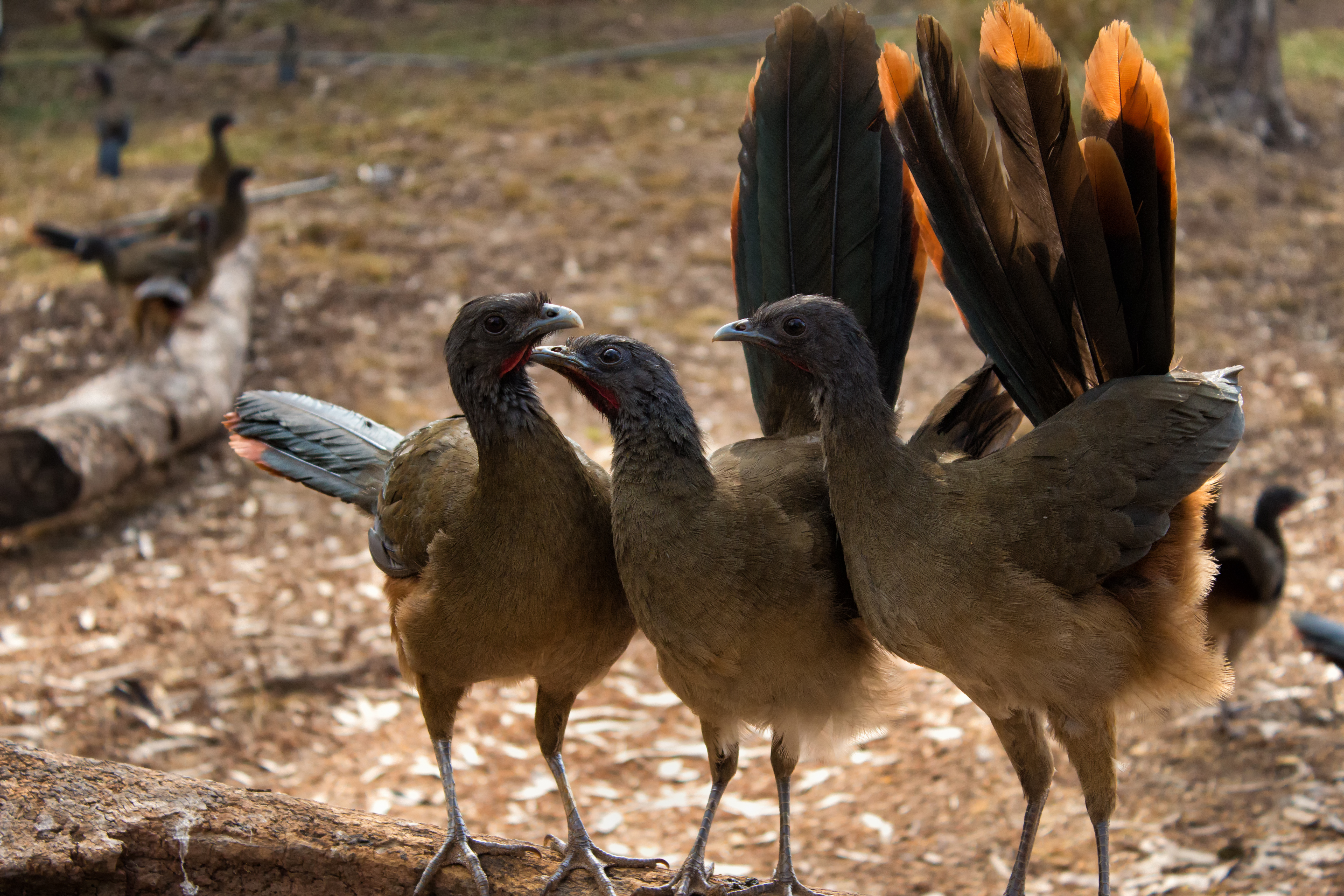 Rufous-vented Chachalaca | Guacharaca del Norte (Ortalis ruficauda)